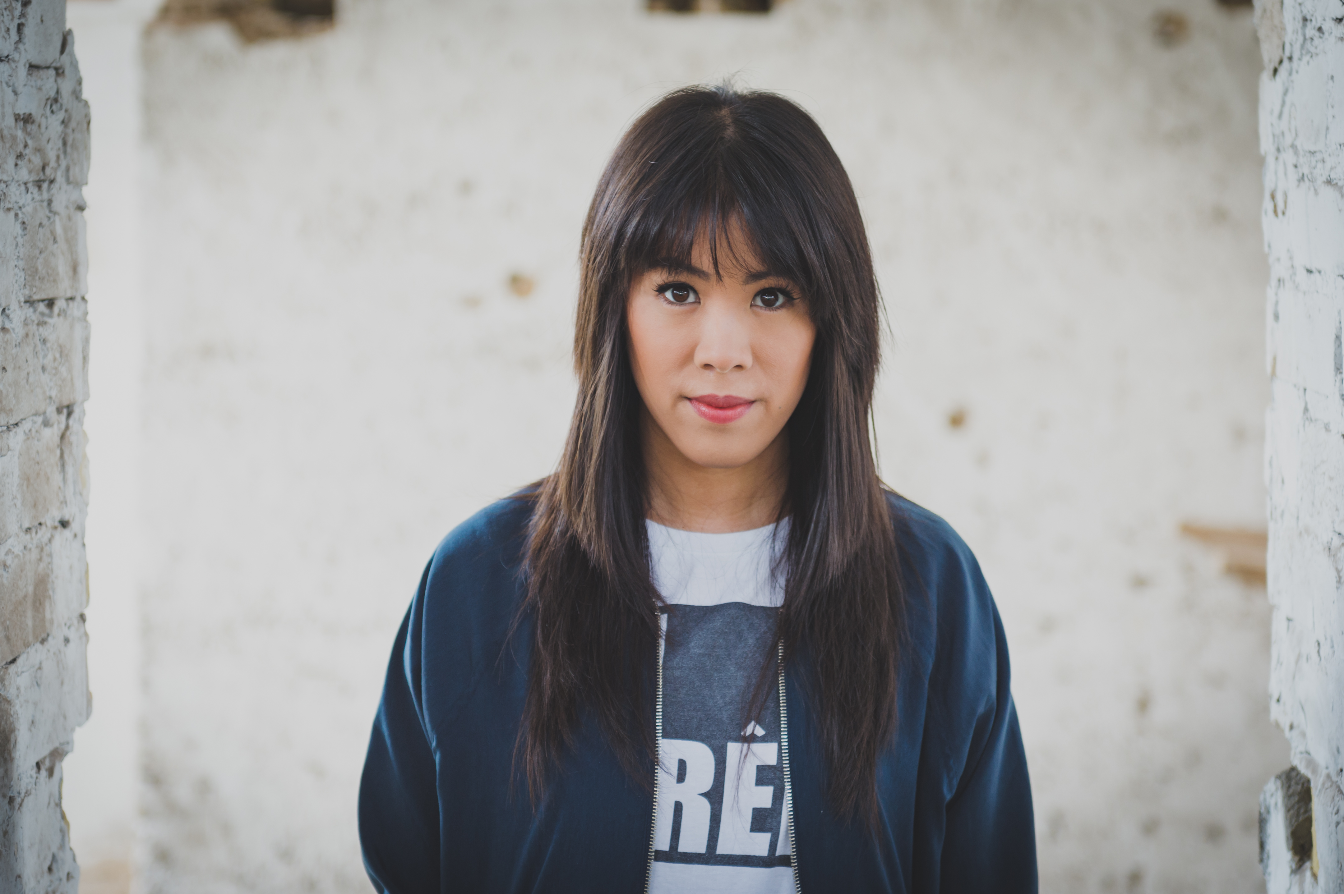 Die Chemikerin, Wissenschaftsjournalistin, Fernsehmoderatorin, Autorin und Youtuberin Mai Thi Nguyen-Kim